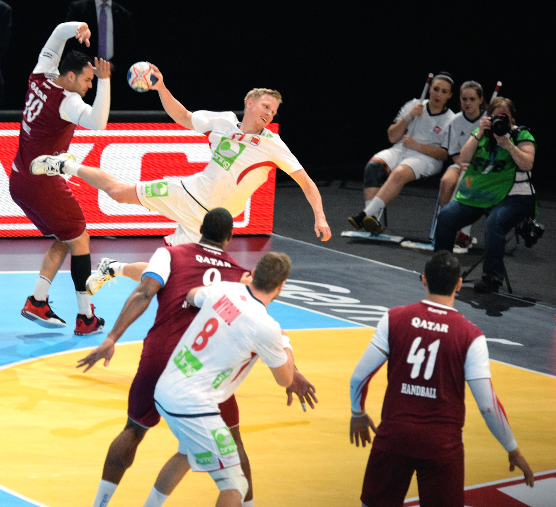 Le 10 janvier 2016 lors du match Norvège / Qatar durant la Golden League à l'AccordHotel Arena (Paris). Magnus Jøndal